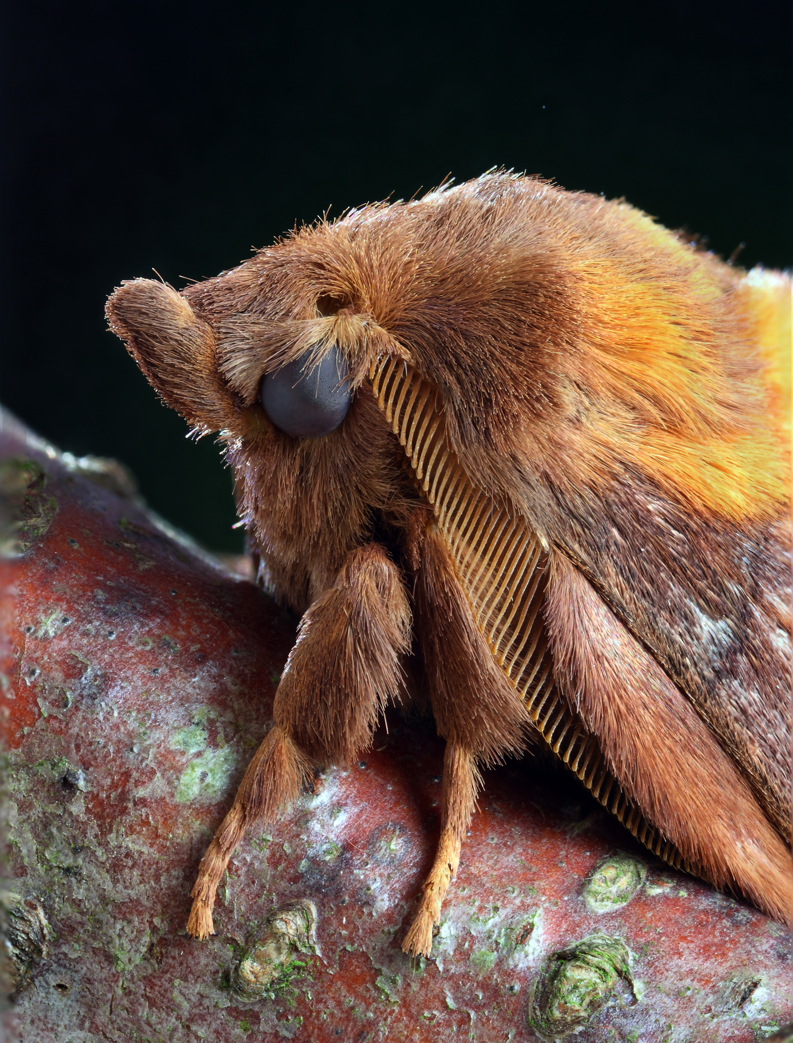 Garden trap, VC37.